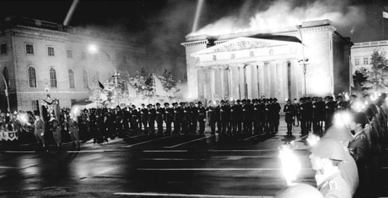 Berlin, 25. Jahrestag DDR-Gründung, Zapfenstreich ADN-ZB Demme 5.10.1974 Berlin: 25. Jahrestag-Ein großer Zapfenstreich der Nationalen Volksarmee fand am 5.10.1974 vor dem Mahnmal für die Opfer des Faschismus und Militarismus Unter den Linden statt. Vor dem Mahnmal, das feierlich in rotes Licht gehüllt war, nahm eine Ehrenformation der NVA Aufstellung.